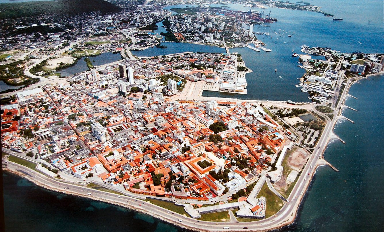 Cartagena de Indias (Colombia) panorámica aérea.